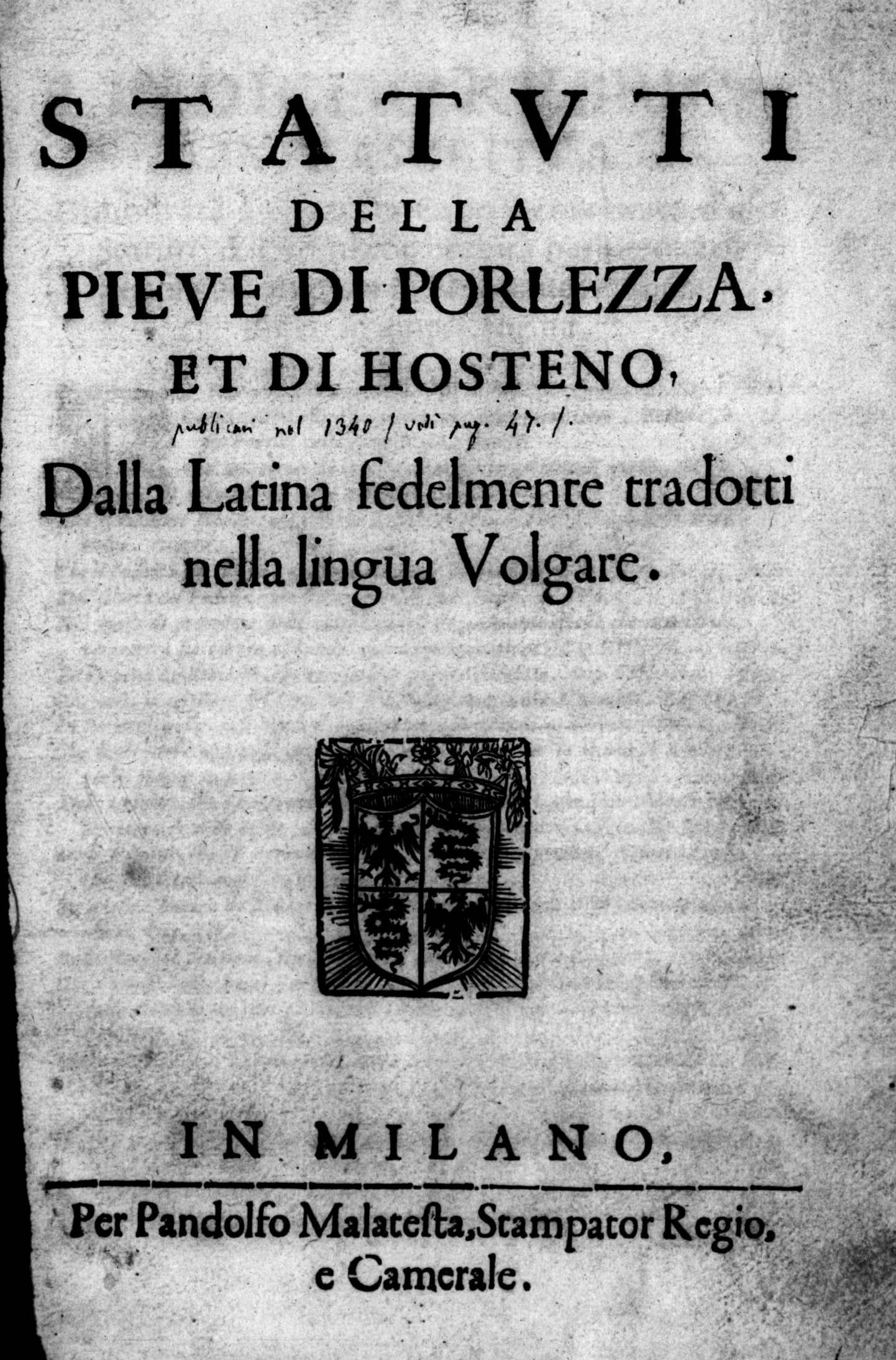 Frontespizio